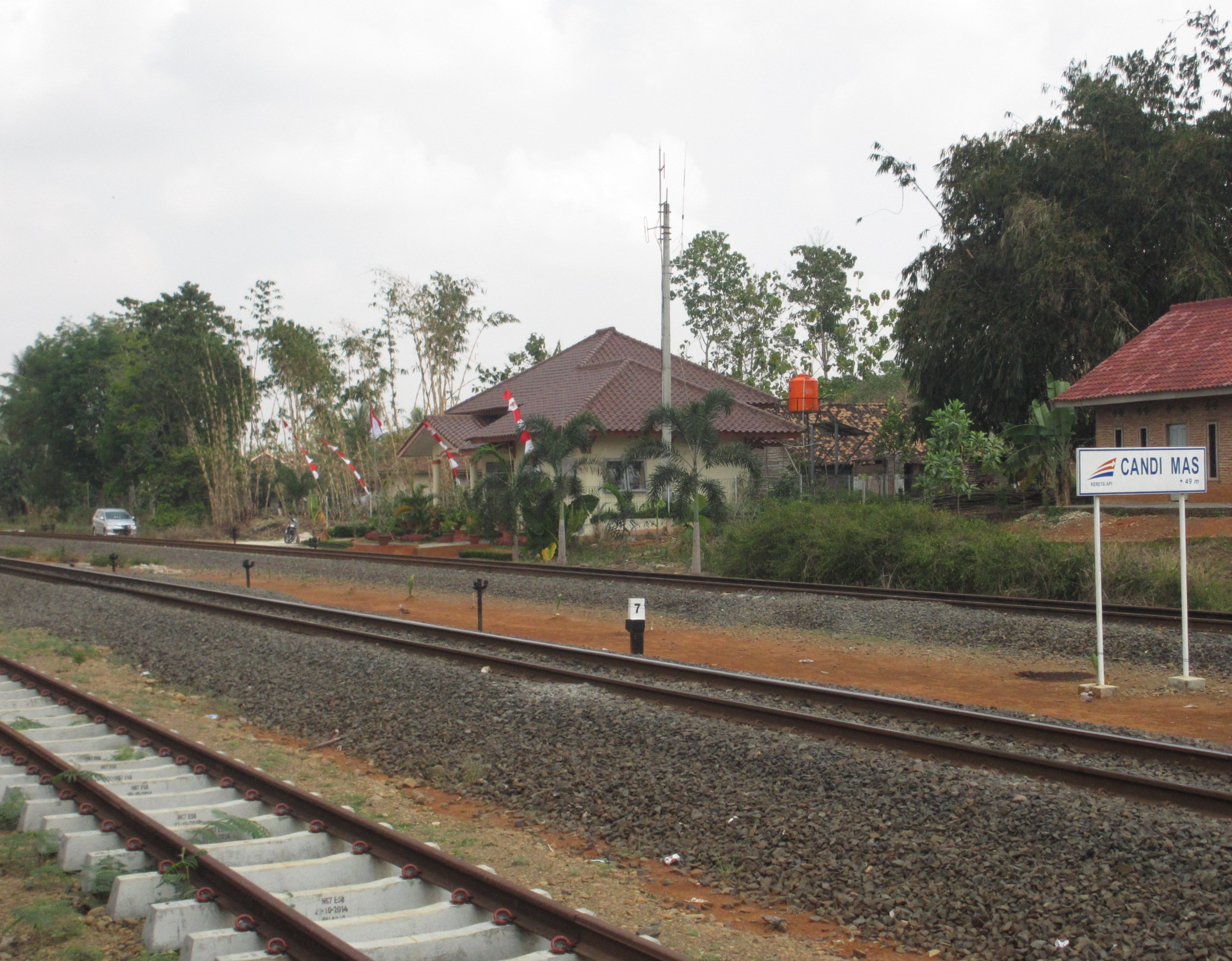 Stasiun Candimas.